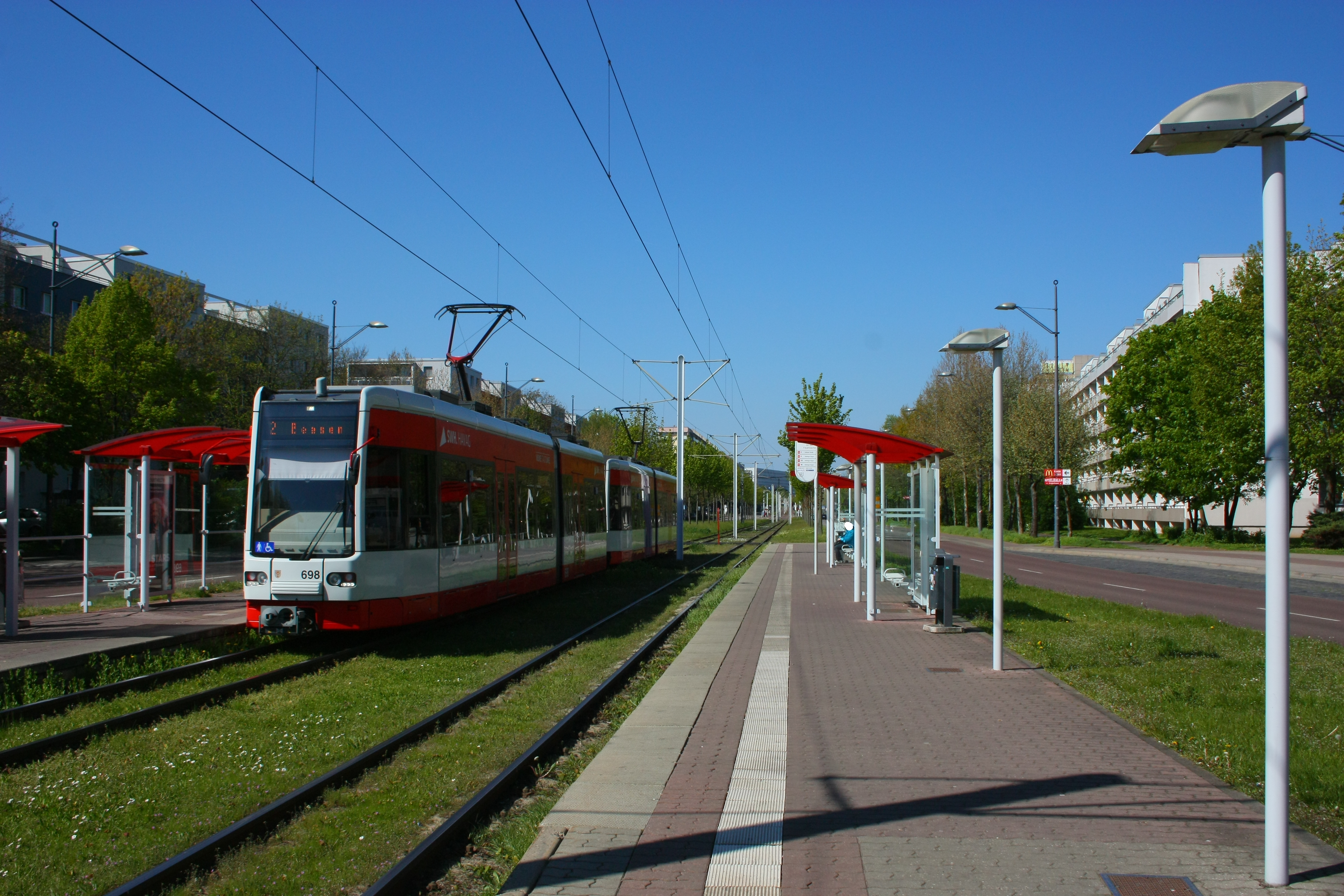 Die Straßenbahnstrecke auf der Magistrale in Halle-Neustadt, auf der Höhe der Feuerwache, Südliche Neustadt